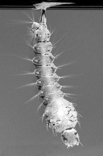 Toxorhynchites speciosus, Culicidae, Diptera